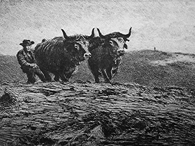 Oeuvre d'Eugène Viala